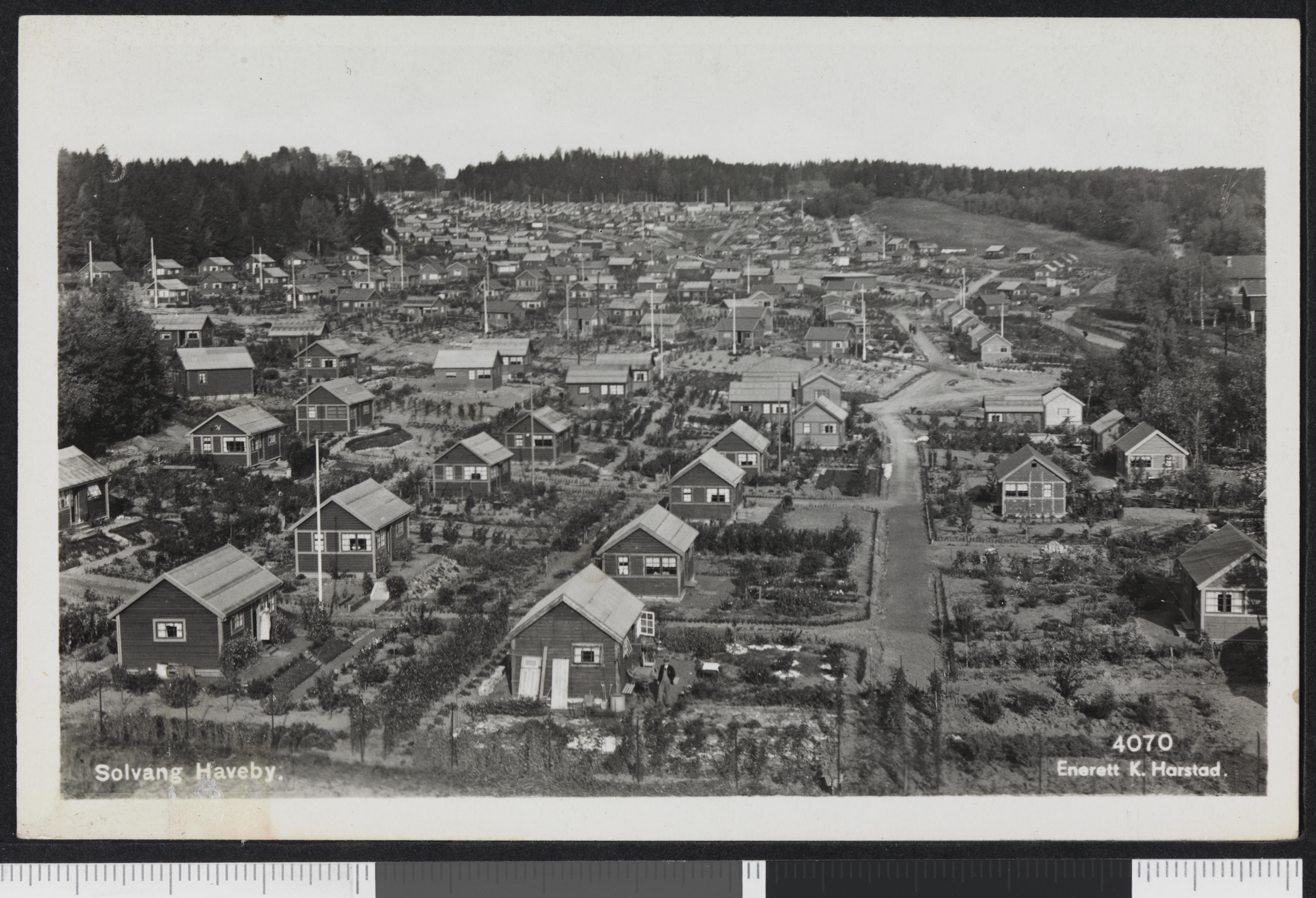 Bildet er hentet fra Nasjonalbibliotekets bildesamling Sogn, Oslo, Oslo